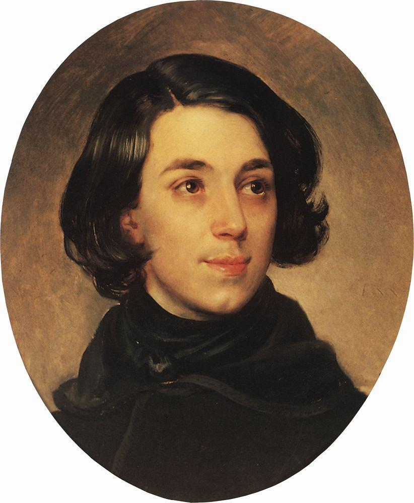 Портрет архитектора И. А. Монигетти. 1840